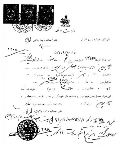 تصویر شناسنامه پروین اعتصامی